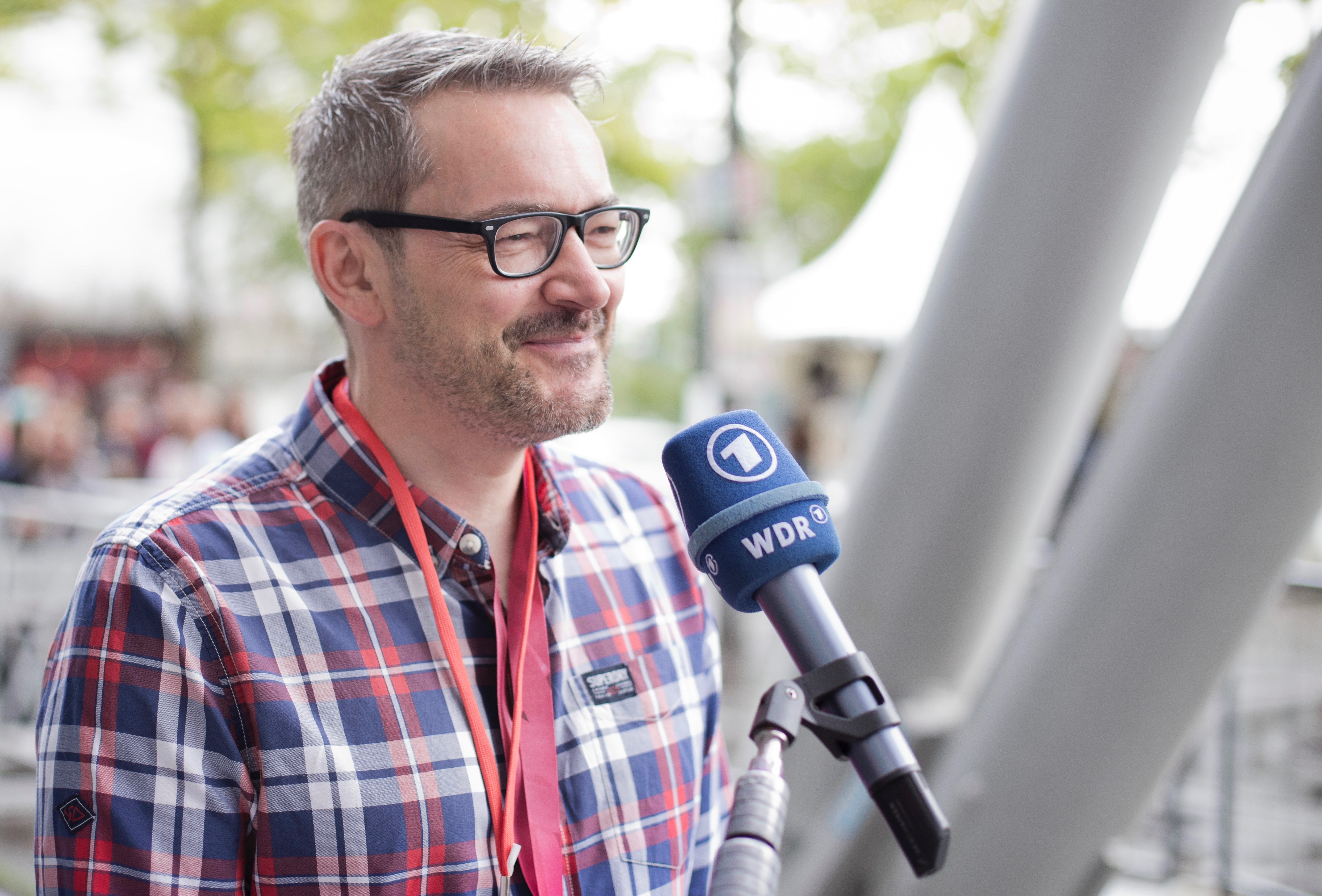 Christoph Krachten, Geschäftsführer der VideoDays, bei einem ARD-Interview vor der Lanxess Arena Köln